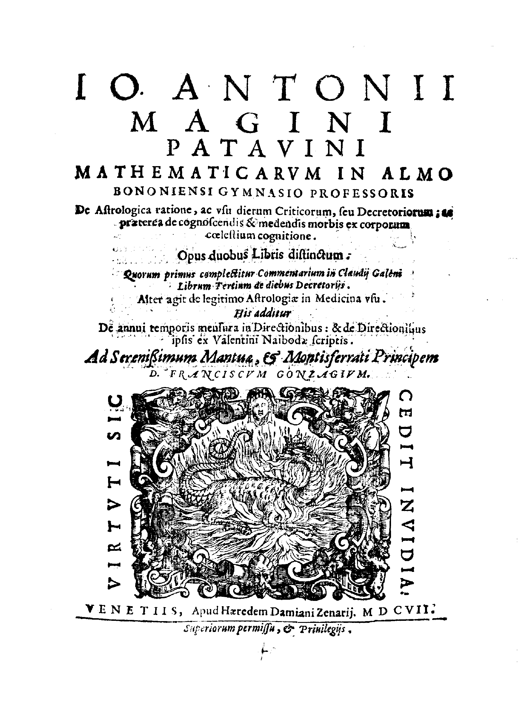 Io. Antonii Magini Patauini ... De astrologica ratione, ac vsu dierum criticorum, seu decretoriorum; ac praeterea de cognoscendis & medendis morbis ex corporum coelestium cognitione. Opus duobus libris distinctum. Quorum primus complectitur commentarium in Claudij Galeni librum tertium de diebus decretorijs. Alter agit de legitimo astrologiae in medicina vsu. His additur de annui temporis mensura in directionibus: & de directionibus ipsis ex Valentini Naibodae scriptis. .... - Venetiis : apud haeredem Damiani Zanarij, 1607 (Venetiis : apud Bartholomaeum Rodellam, haeredem Damani Zenarij, ad Salamandrae signum, 1607). - [10], 120 [i.e. 118] c. : ill. ; 4º .